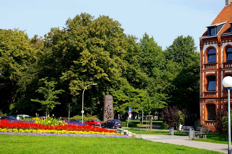 Lutherpark Witten, Eingang, Denkmal. Die Ansicht des Parks hat sich seit dem Sturm Kyrill im Frühjahr 2007 massiv verändert. So sind die Bäume hinter dem Denkmal zu einem großen Teil verschwunden.